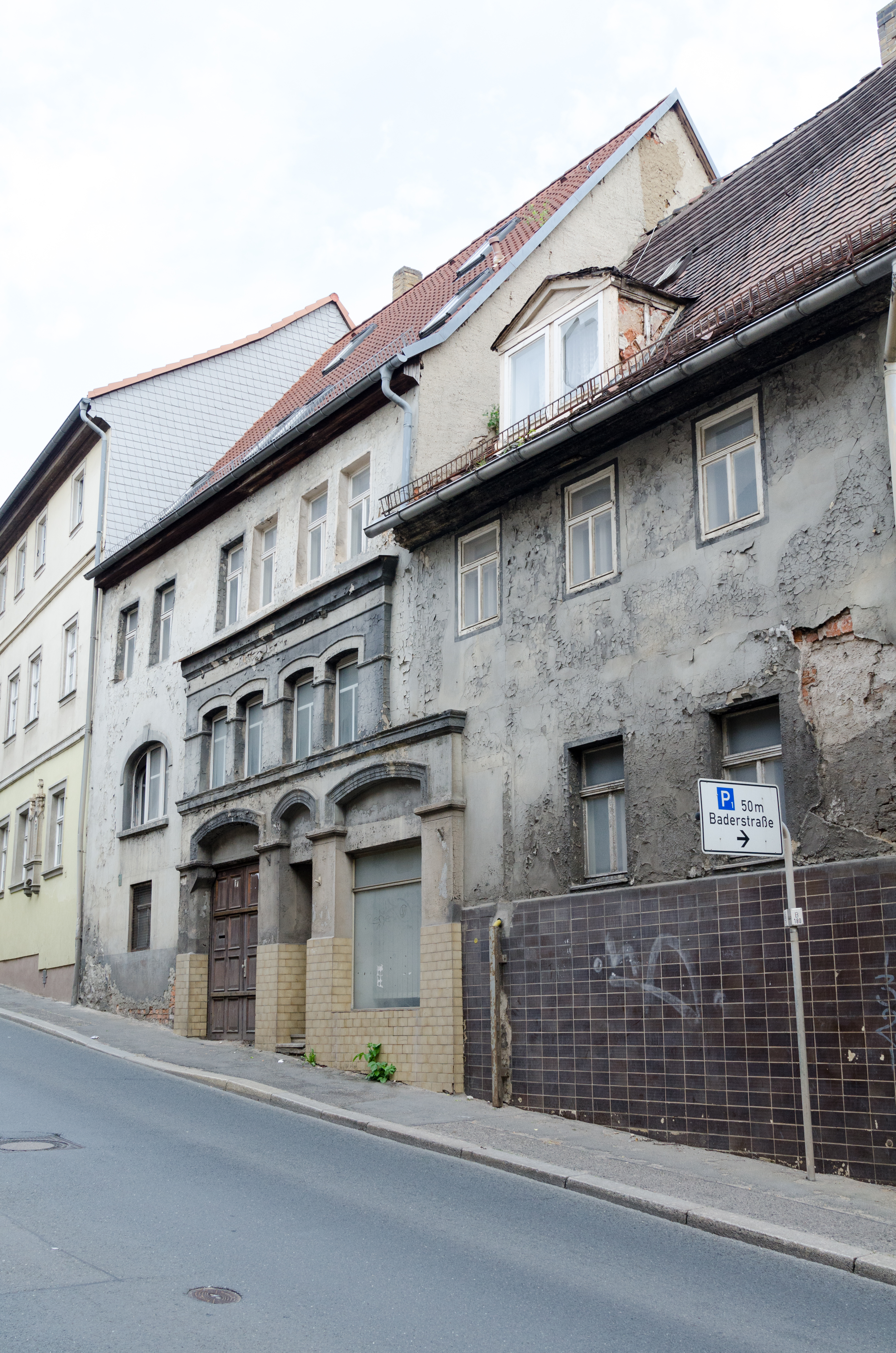 Zeitz, Rahnestraße 17